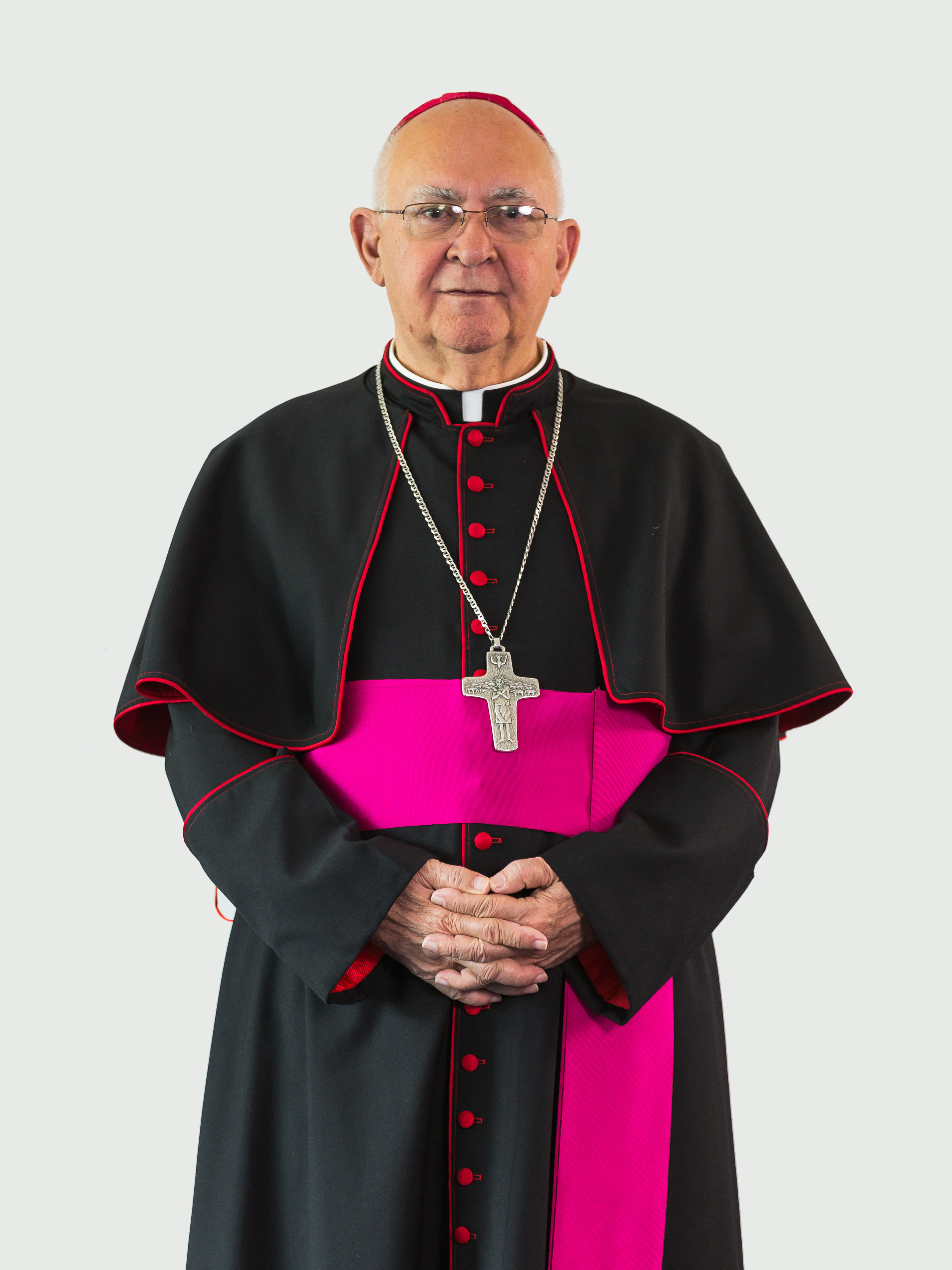 Obispo Antonio Camilo.